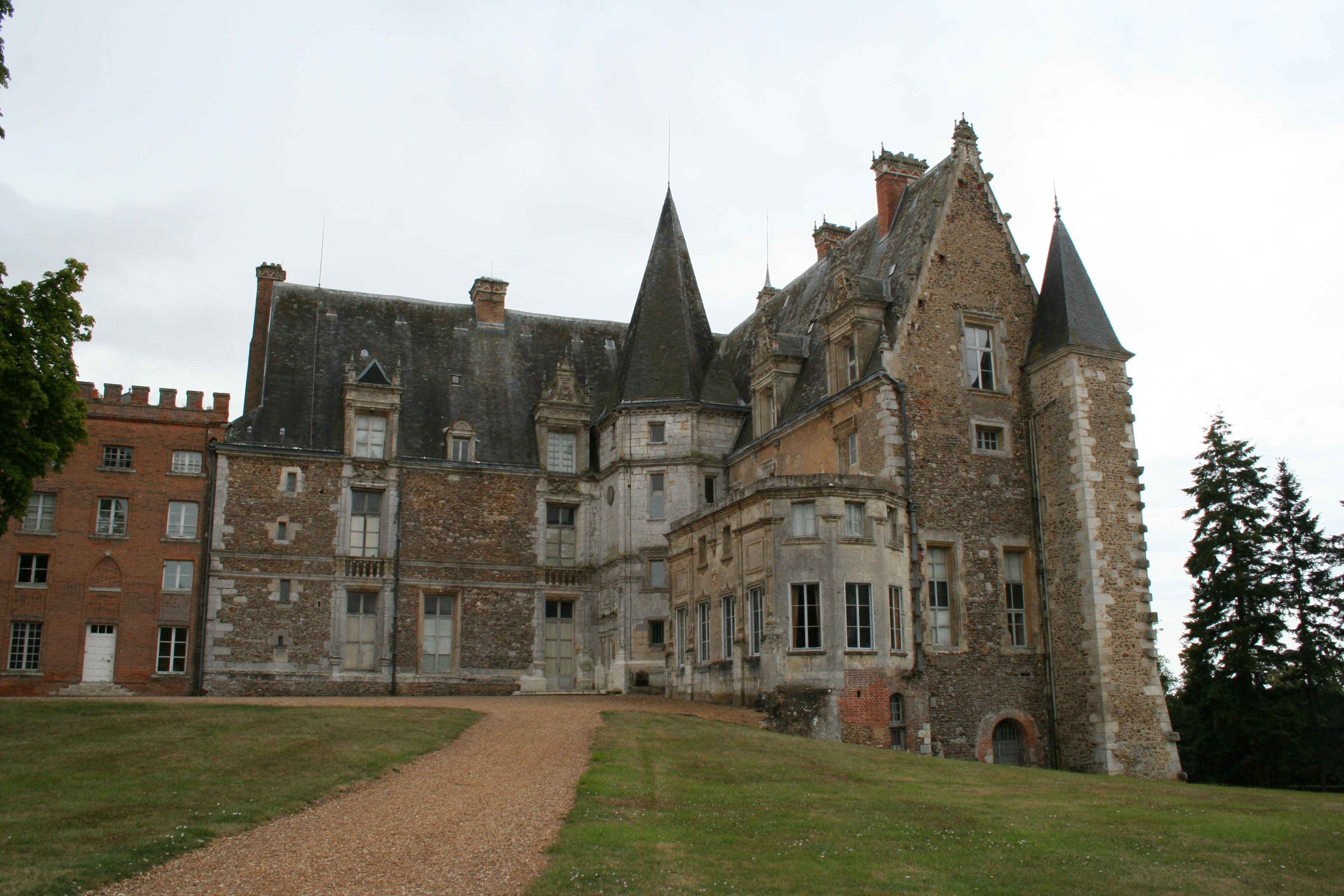 Château de Courtalain et ses dépendances - Courtalain - Eure-et-loir - France - Mérimée PA00097086 .